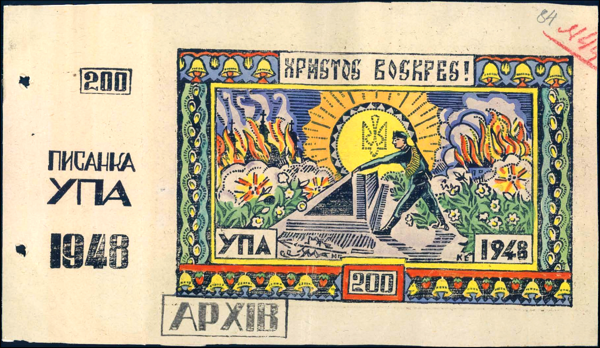 Великодній бофон Львівського крайового проводу ОУН за 1948 рік номіналом 200 карбованців. Архіви: ГДА СБУ — Ф. 13. — Спр. 1102.